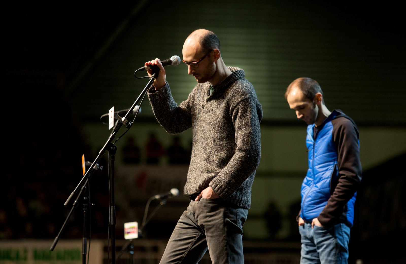 2017ko Bertsolari Txapelketa Nagusiko finalean Argiako Dani Blancok egindako argazkia.